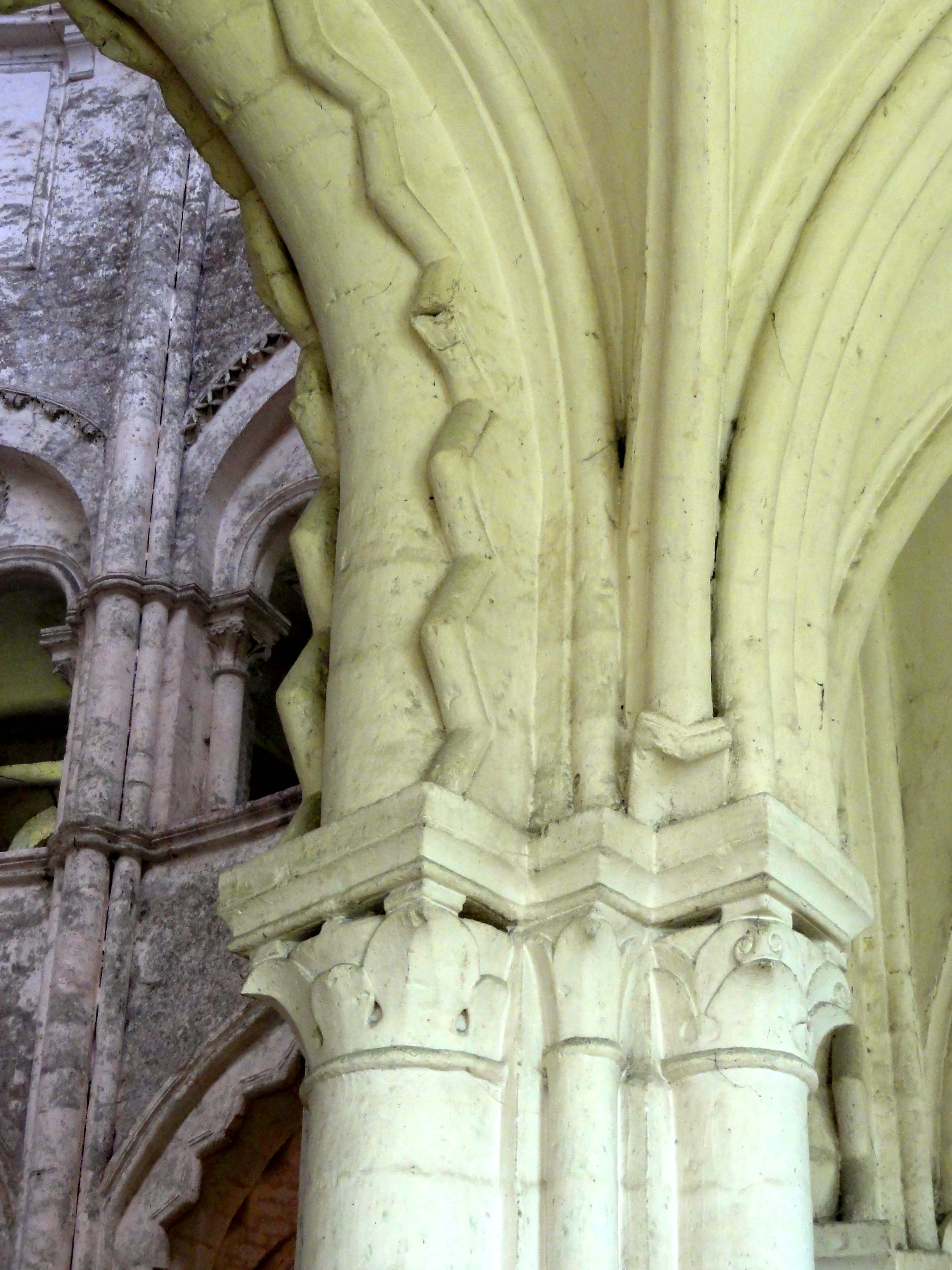 Déambulatoire de l'abbatiale et chapelles rayonnantes - voir le titre du fichier.